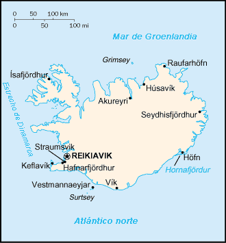 Mapa político de Islandia.